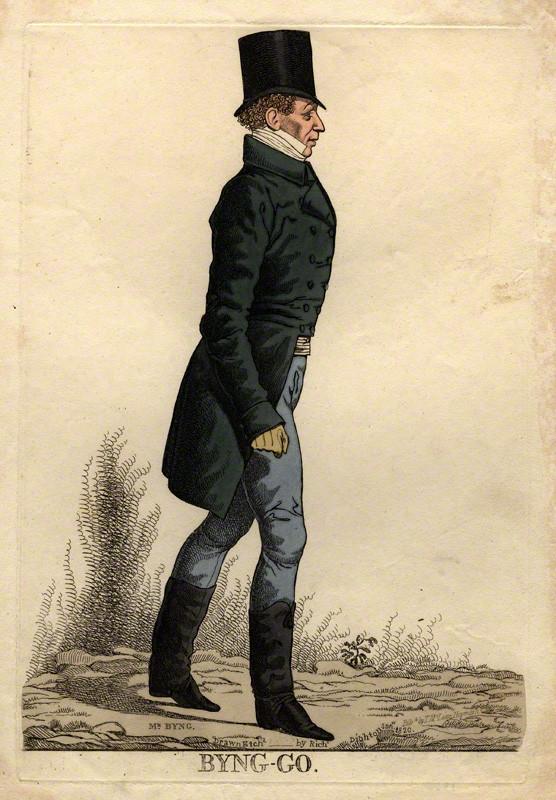 Karrikatur des englischen Politikers George Byng (1764-1847) veröffentlicht 1820